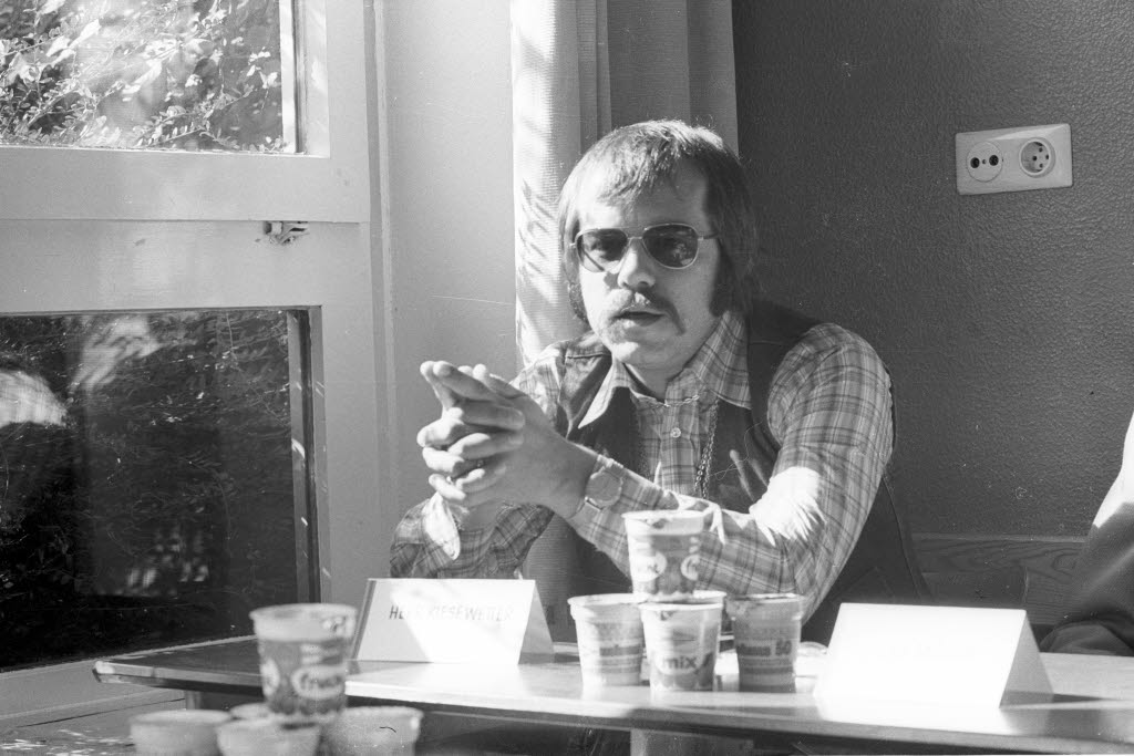 in der Timm-Kröger-Schule am Elendsredder 26. Der Liedermacher verteilte Freimilch und stiftete für die Timm-Kröger-Schule und die benachbarte Peter-Petersen-Schule einen Milchvorrat für 14 Tage.